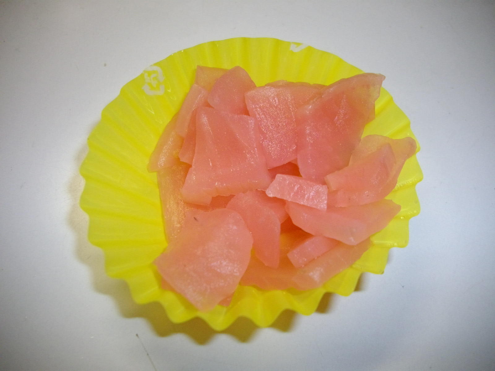 「桜漬け大根」 市販の弁当に入っていたもの